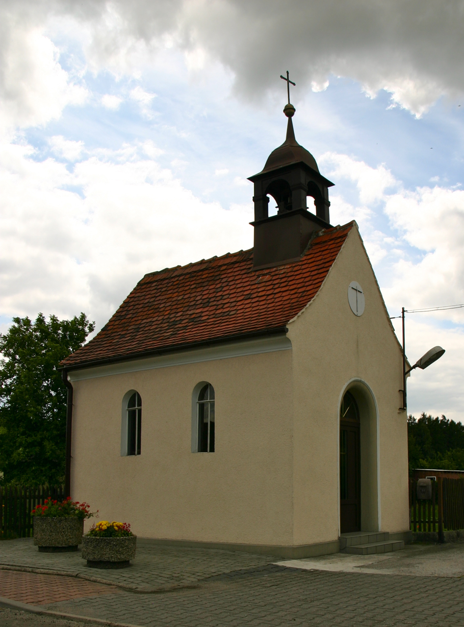 Dombrowka, polnisch Dąbrówka ist eine Ortschaft in der Gemeinde Gogolin im Powiat Krapkowicki in der polnischen Wojewodschaft Oppeln.